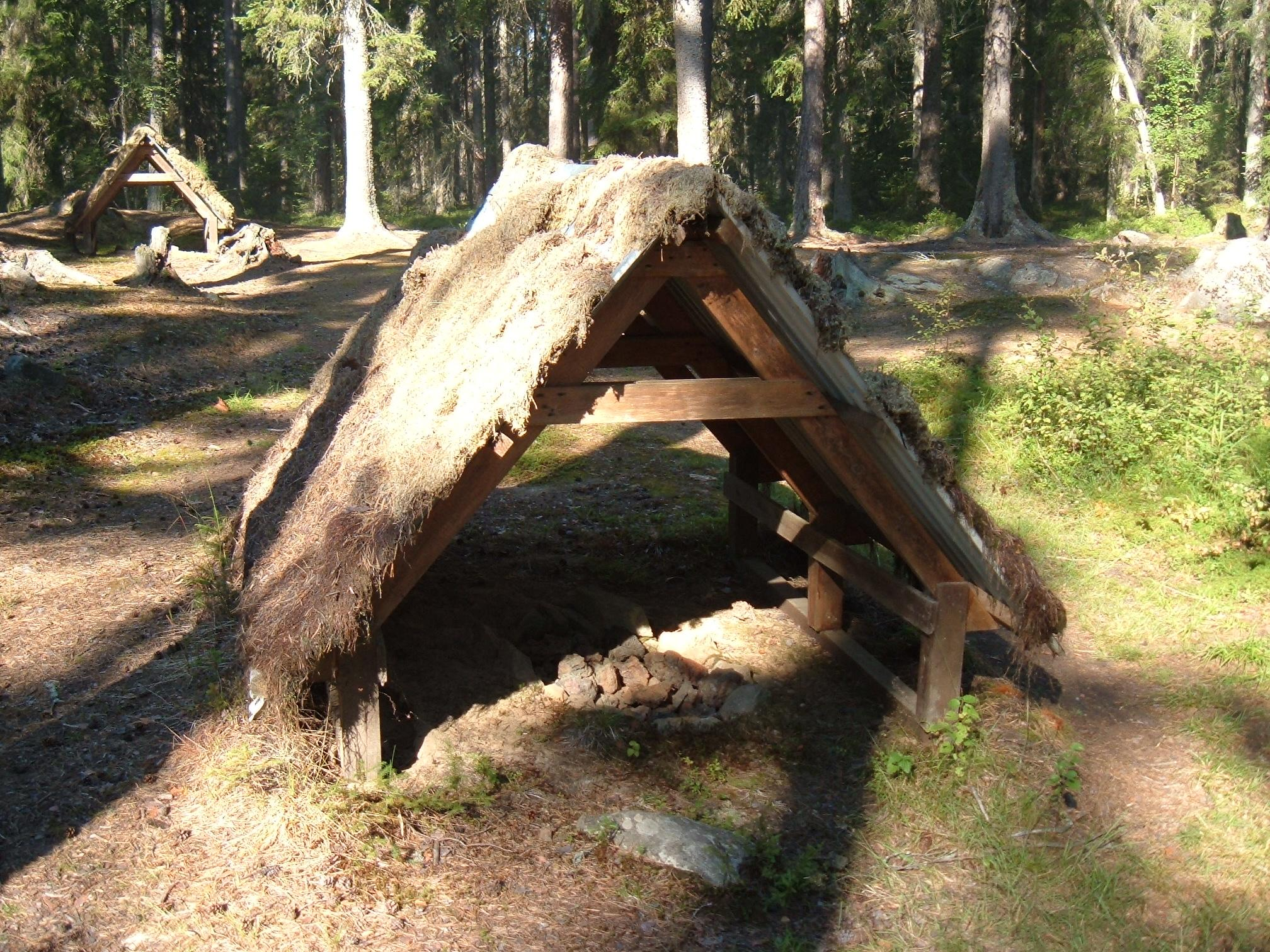 Röda Jorden i Riddarhyttan. Gammal blästerugn (nybyggt tak).